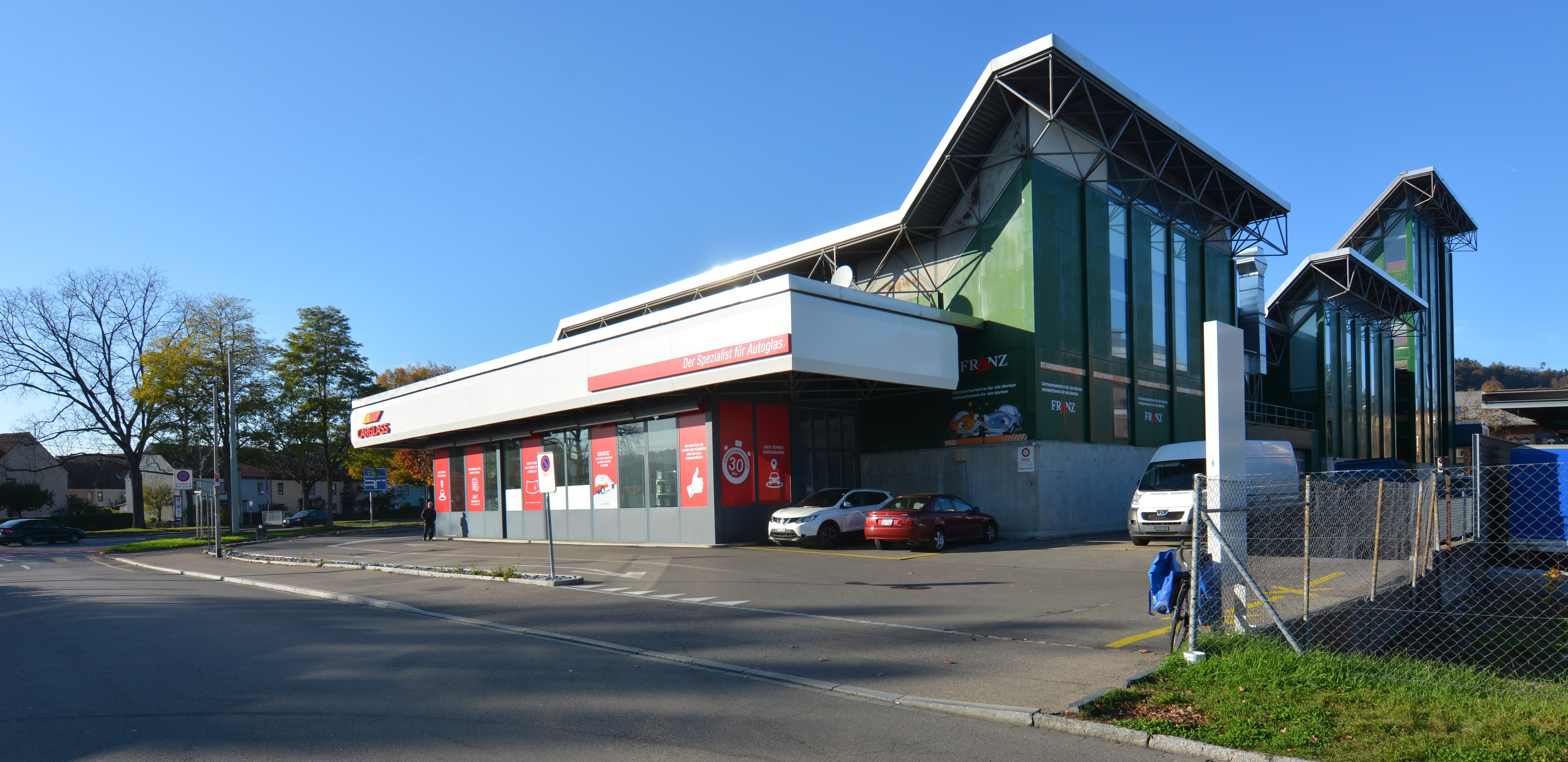 Grossgarage der Frank AG in Grüze, Winterthur, 1971–75. Rückseite. Architekt: Frank Krayenbühl